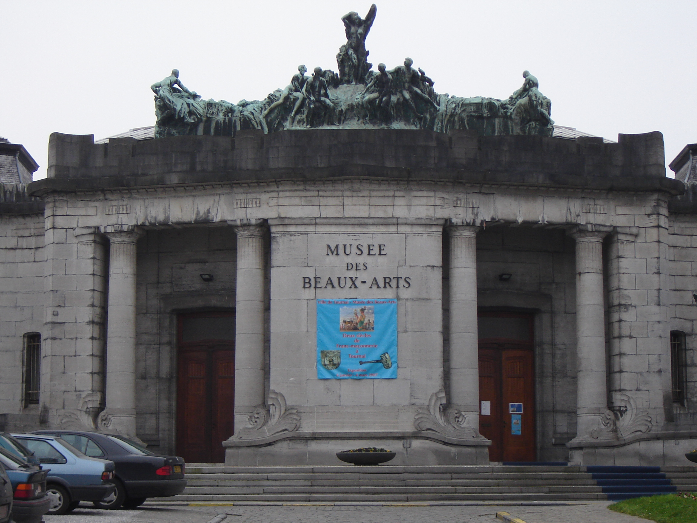 Musée des Beaux-Arts in Tournai, Hainaut, Belgium